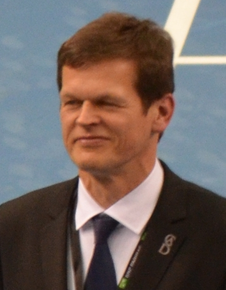 DTB-Präsident Karl-Georg Altenburg bei der Davis-Cup-Begegenung Deutschland gegen Spanien (cropped)